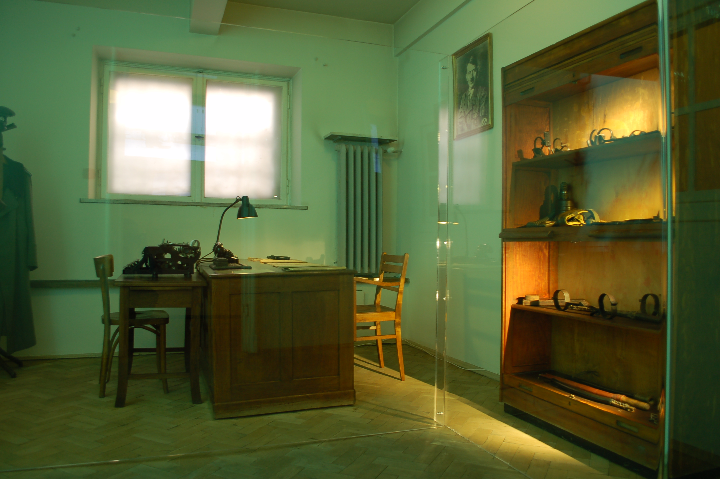 Mausoleum of Struggle and Martyrdom, Warsaw